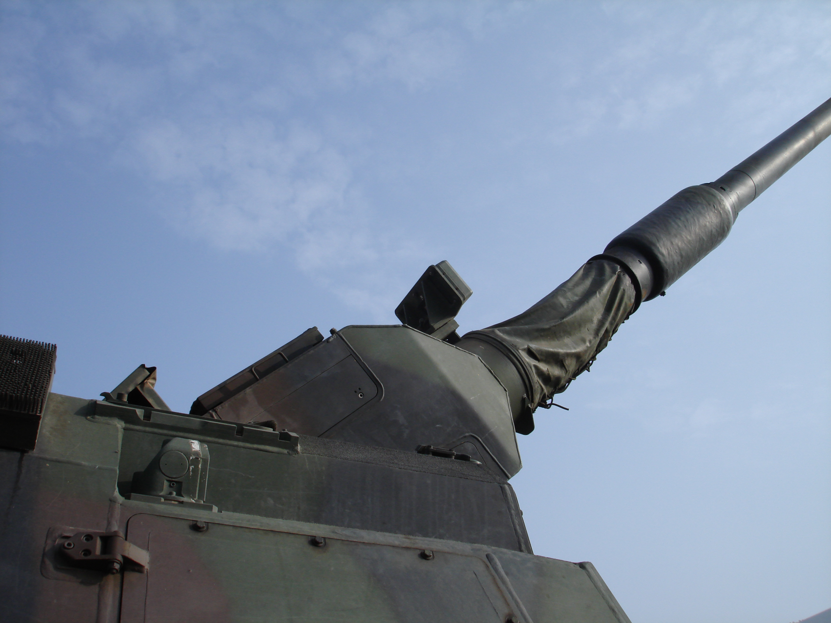 Panzerhaubitze 2000 beim Tag der offenen Tür der Wehrtechnische Dienststelle für Kraftfahrzeuge und Panzer (WTD 41) in Trier. Das V-Null Messgerät auf der Waffenwiege im Detail. An der rechten Turmseite (links unten im Bild) befindet sich das Panzerzielfernrohr TN 80 zum direkten Richten.